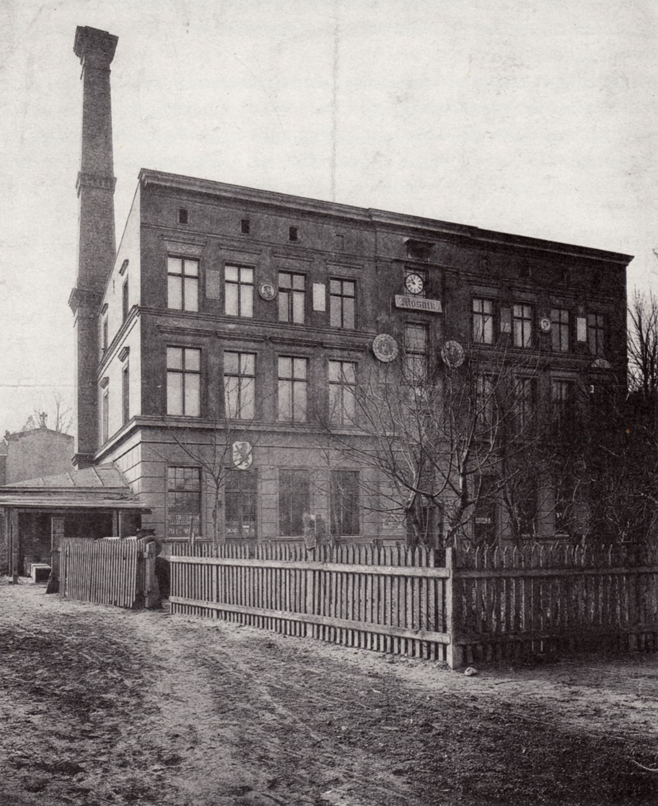 Deutsche Glasmosaik-Gesellschaft Puhl & Wagner − Rixdorf, Berlin: Ansicht der Fabrik an der Berlinerstraße 7−8, um 1900